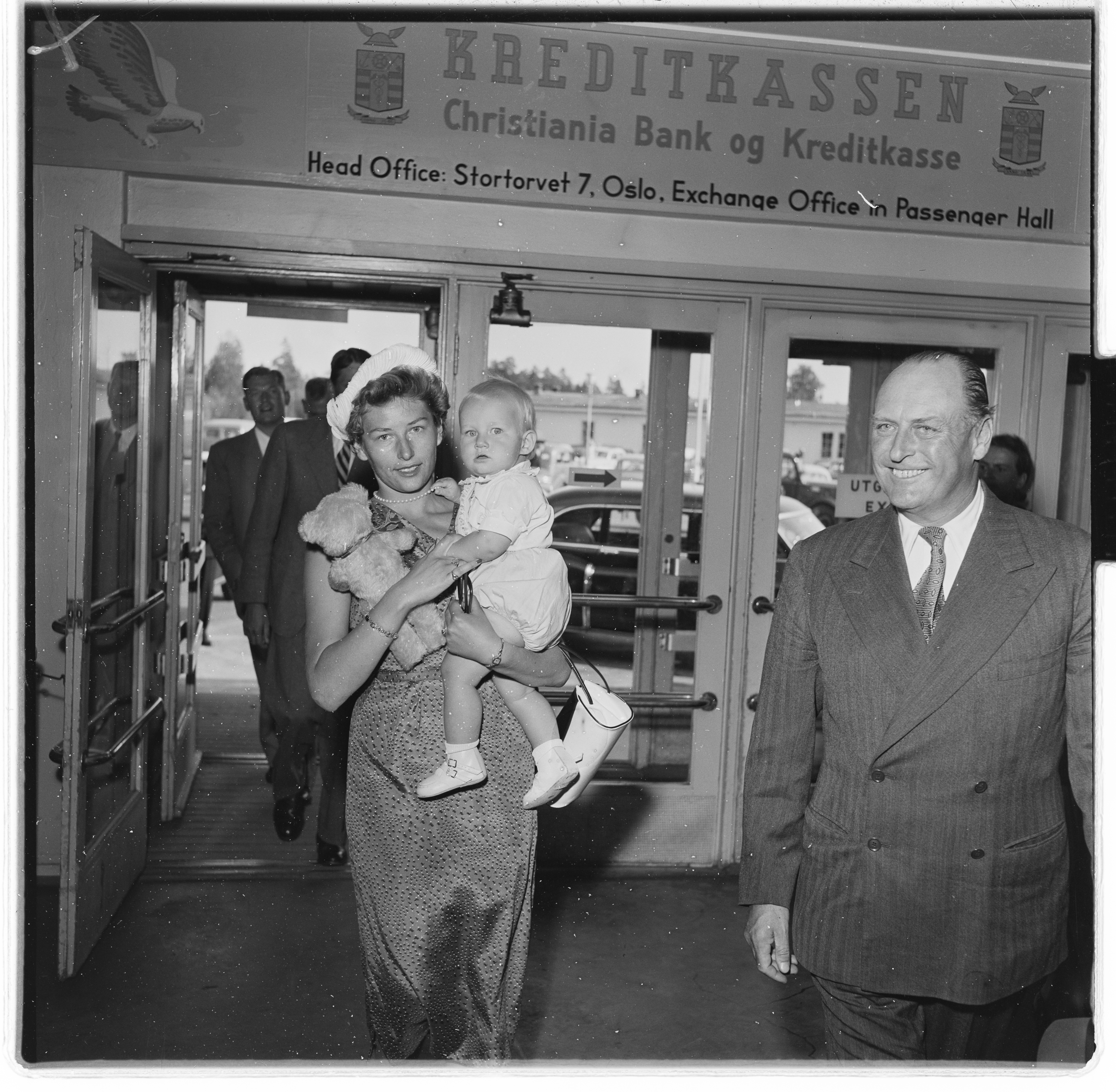 Bildet er hentet fra Arkivverket. Ragnhild, Erling og lille Haakon (Lorentzen), Fornebu Arkivinstitusjon : Riksarkivet Arkivnavn : Billedbladet NÅ Sted : Norge, Akershus, Bærum, Fornebu Emneord: kongelige, flyplass, barn Avbildet: Lorentzen, Ragnhild;Lorentzen, Haakon;Kong Olav